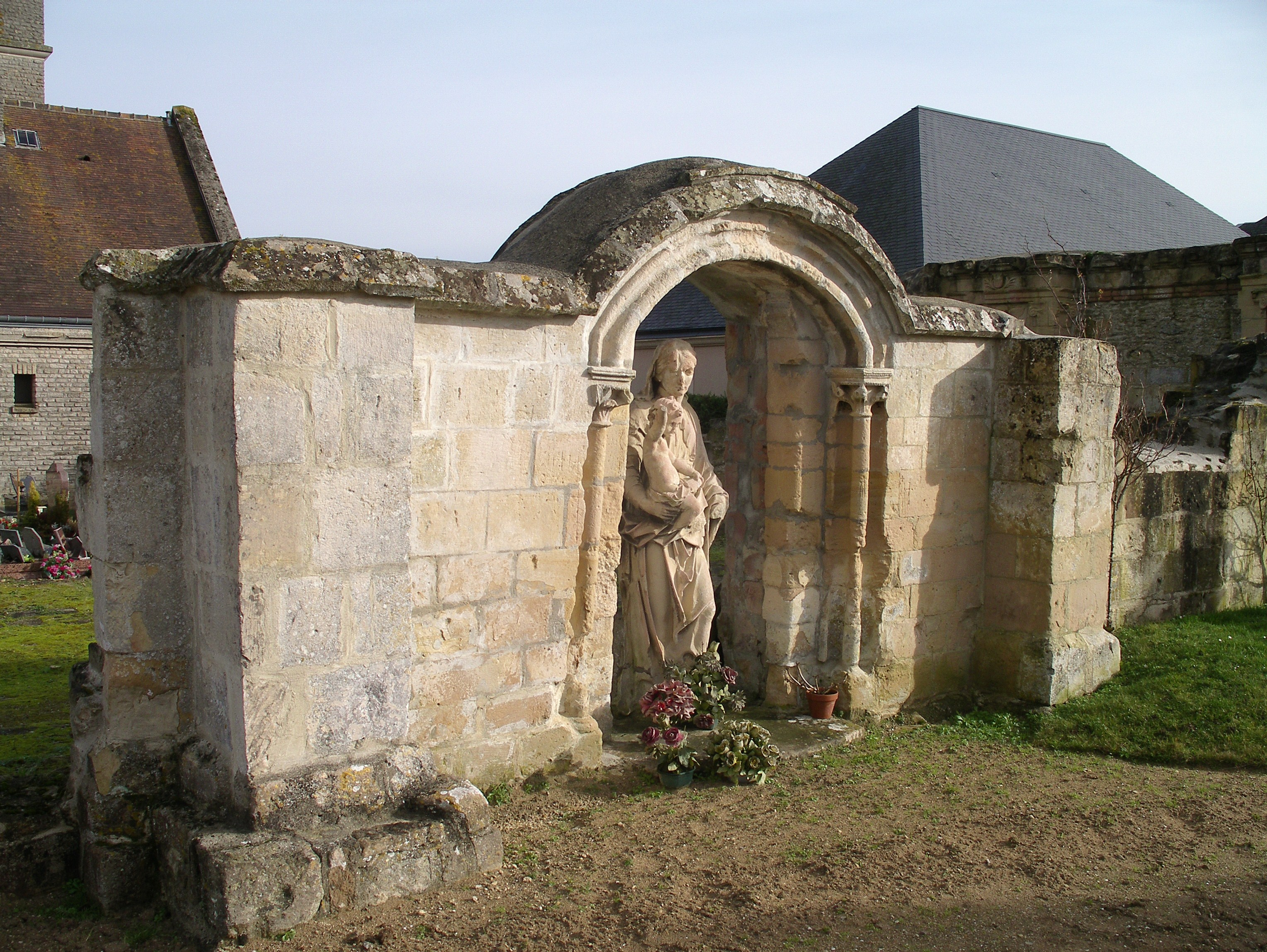 Vestiges de l'église Saint-Pierre de Bréville-les-Monts (Calvados)